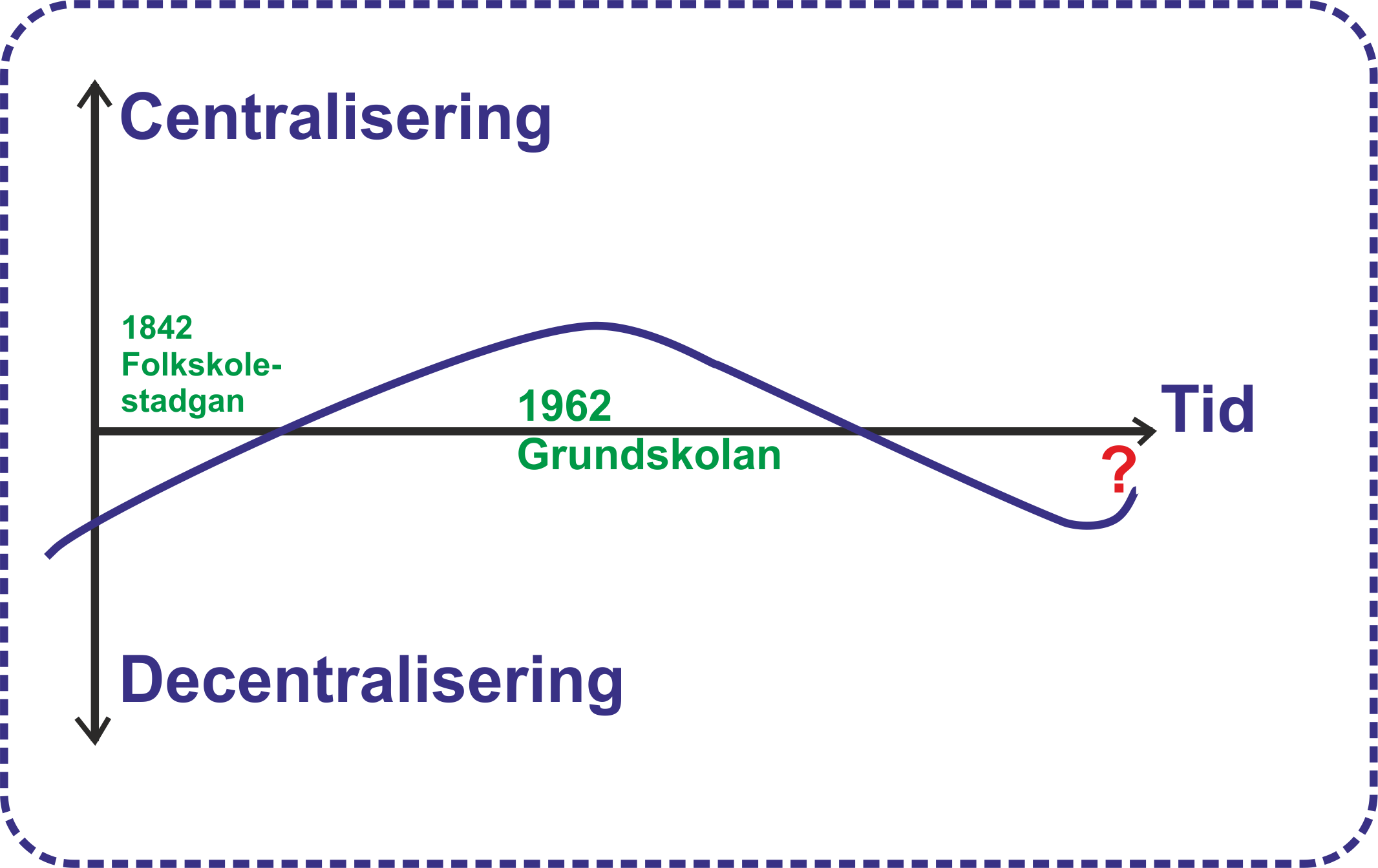 Ett diagram som beskriver svängningarna i centralisering och decentralisering av den svenska skolan. Ritad efter teorierna i boken "Utbildningshistoria (2011), avsnittet skrivet av Pia Skott.